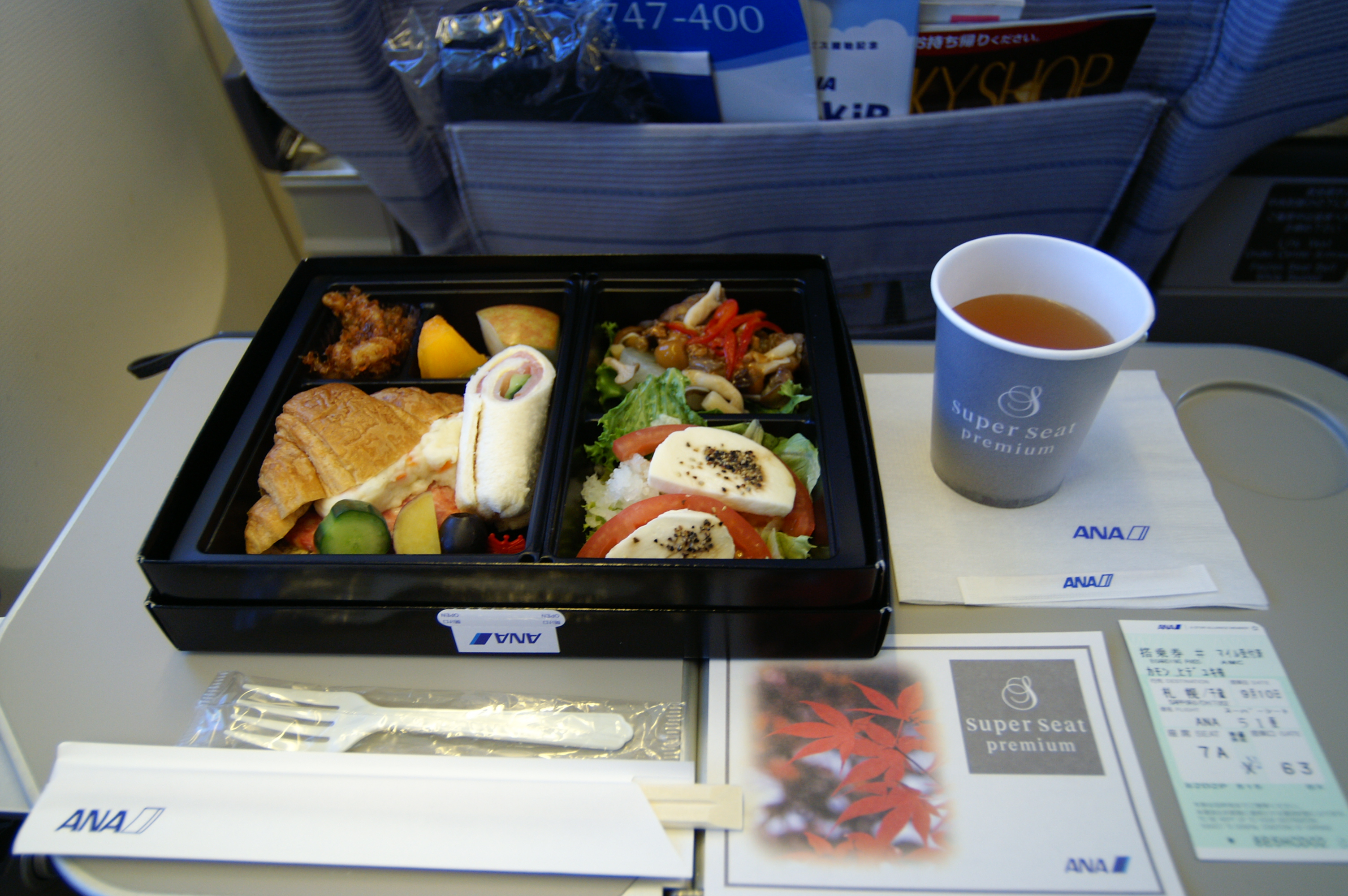 機内食(朝食)が出ました。 (2006/09/10 In Flight, NH51, JAPAN)